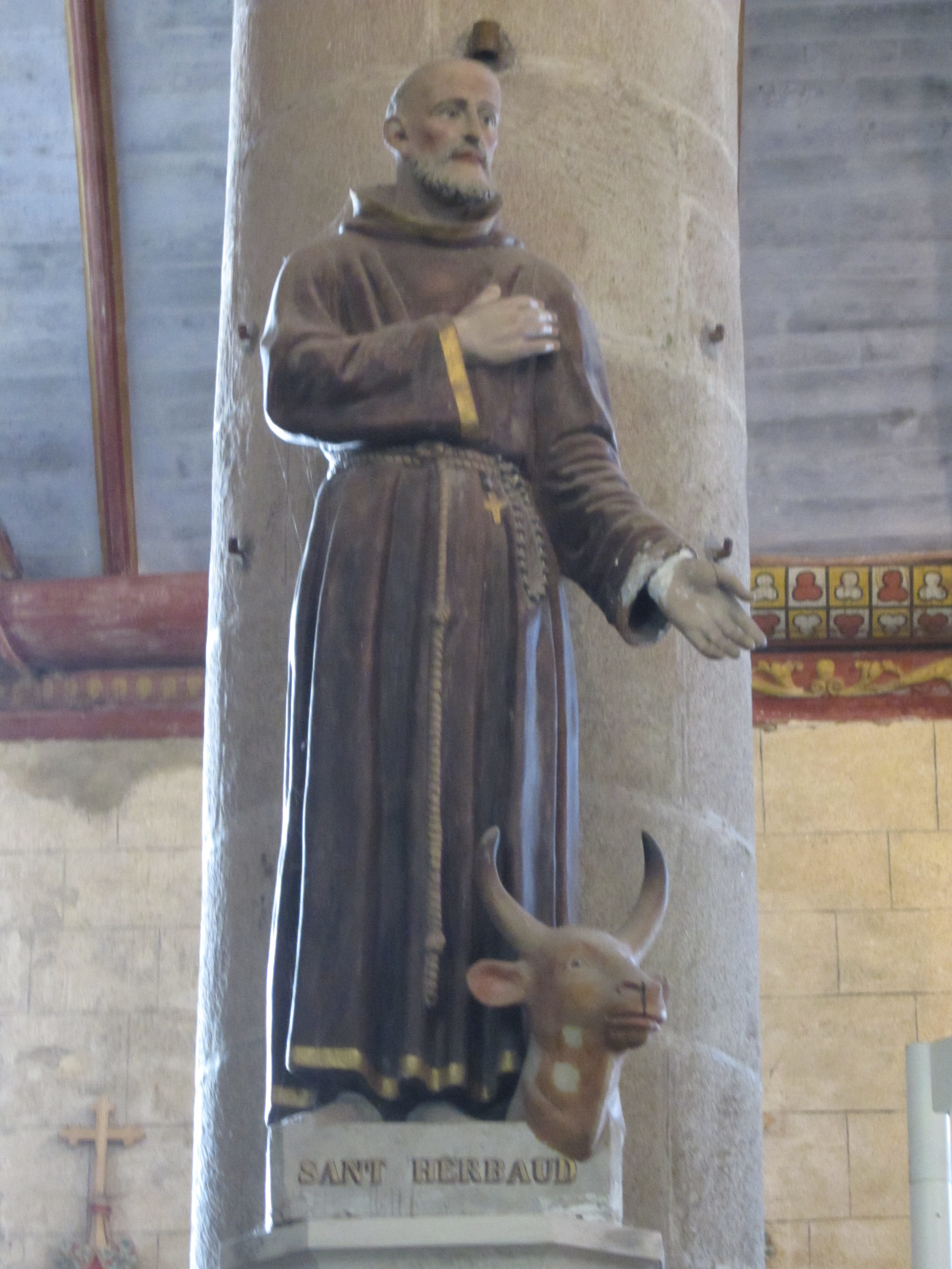 Statue de Saint Herbot dans l'église Saint Germain de Pleyben.